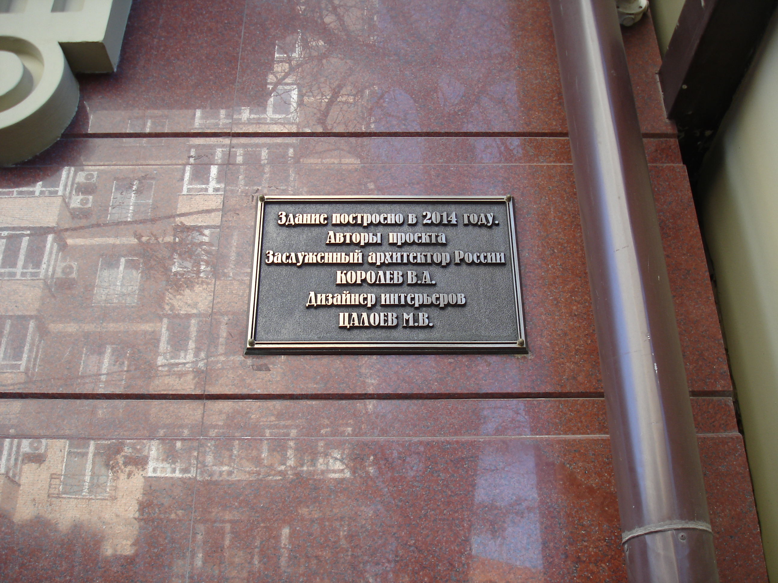 Компания "Дон-Медиа, пресс-центр, ул. Суворова, 26 (табличка на здании).